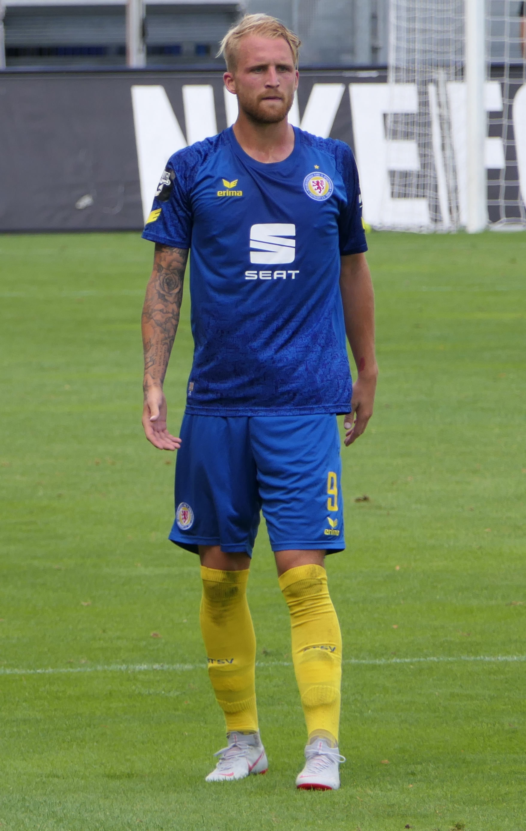 Der Fussballprofi Philipp Hofmann im Trikot von Eintracht Braunschweig beim Auswärtsspiel beim SV Wehen Wiesbaden am 11.08.2018.